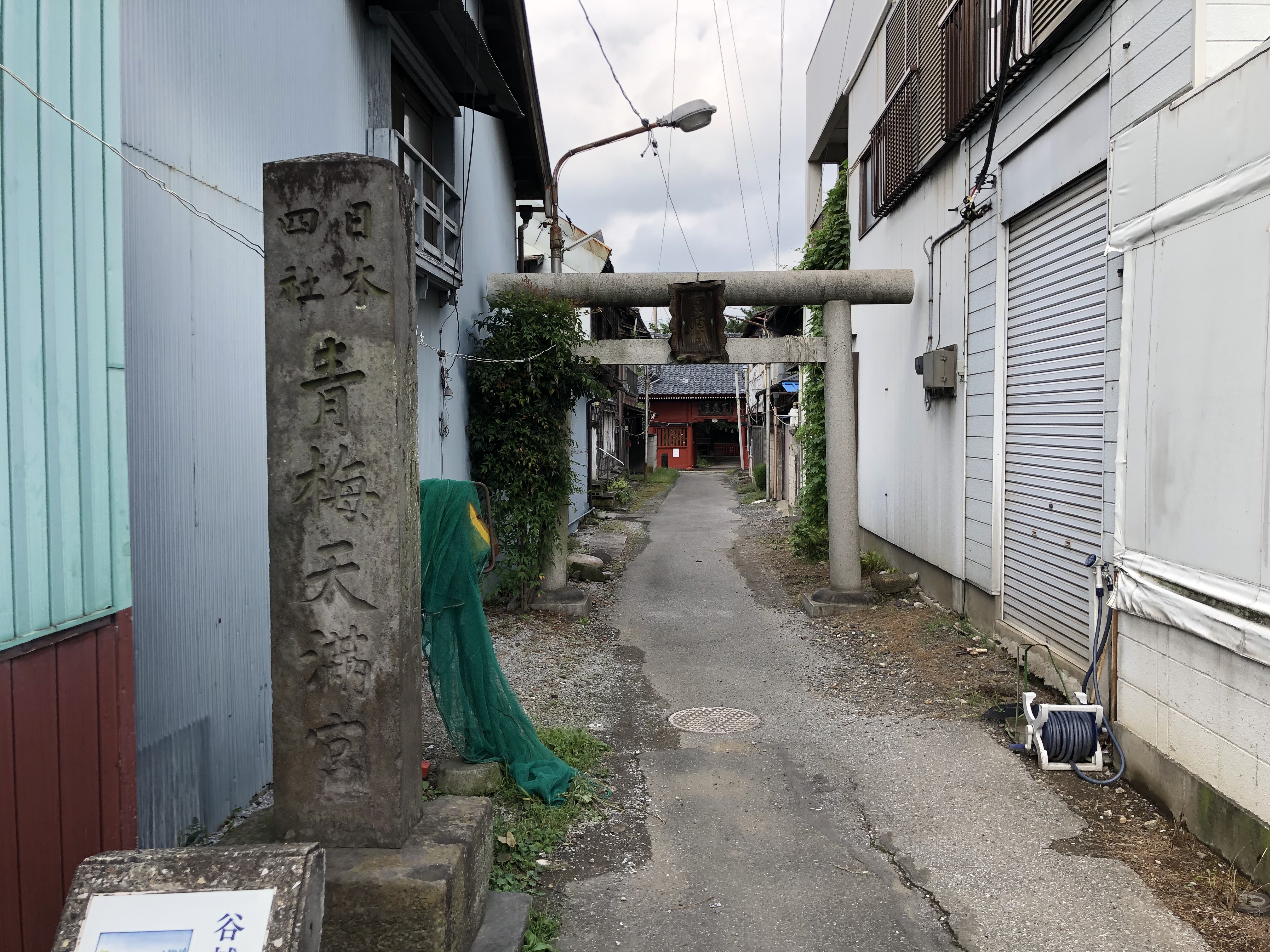 館林青梅天満宮、参道と鳥居、日本四社の石柱